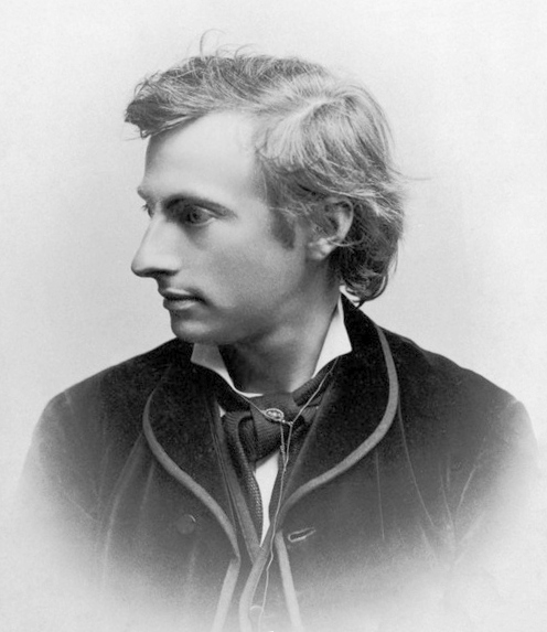 Karl Gjellerup, Danish writer, Nobel Prize 1917